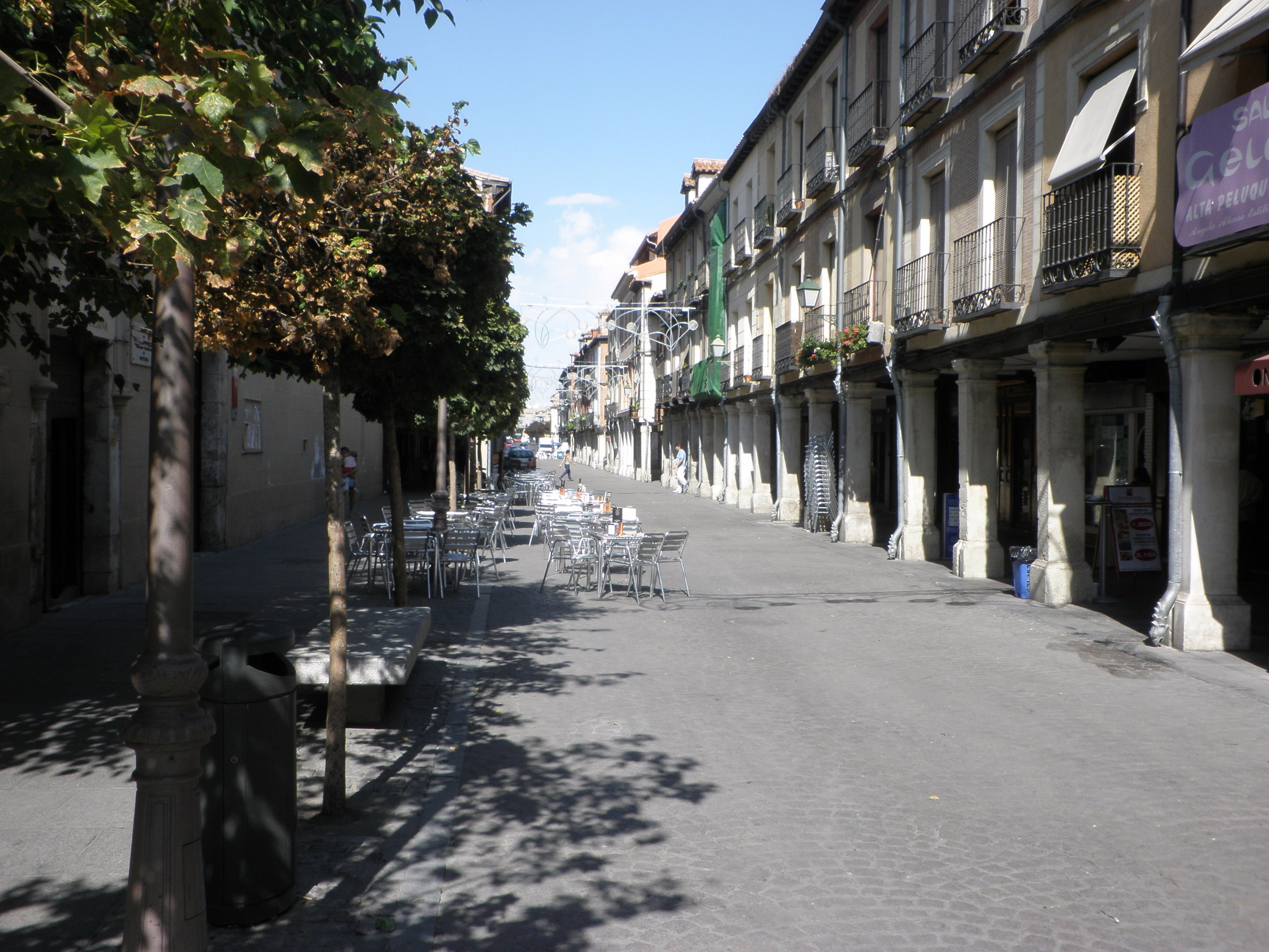 La calle Mayor de Alcalá de Henares (Comunidad de Madrid - España).